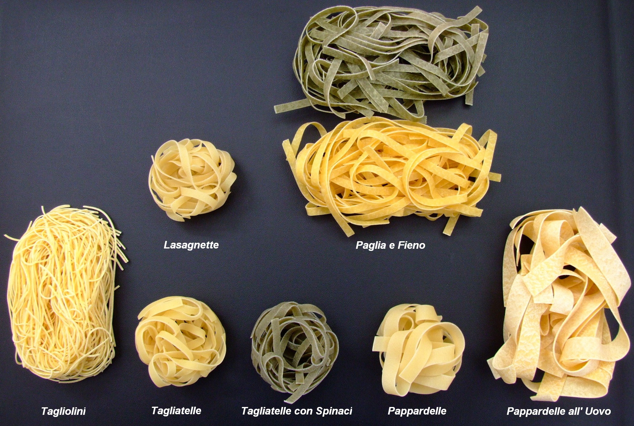 Quelle: selbst fotografiert, 11/2006 Fotograf: Späth Chr.